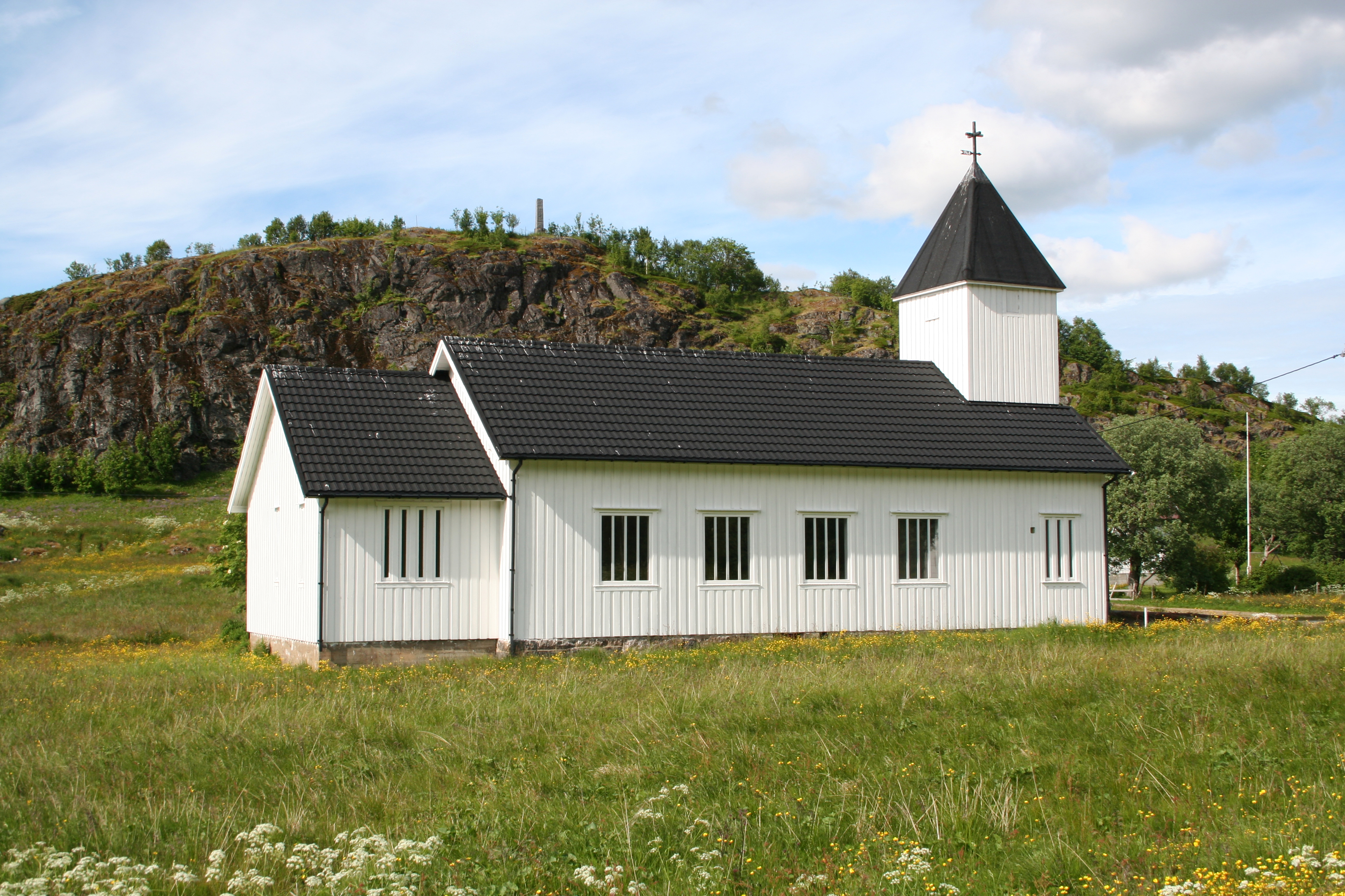 Grønning Church in Hadsel, Norway